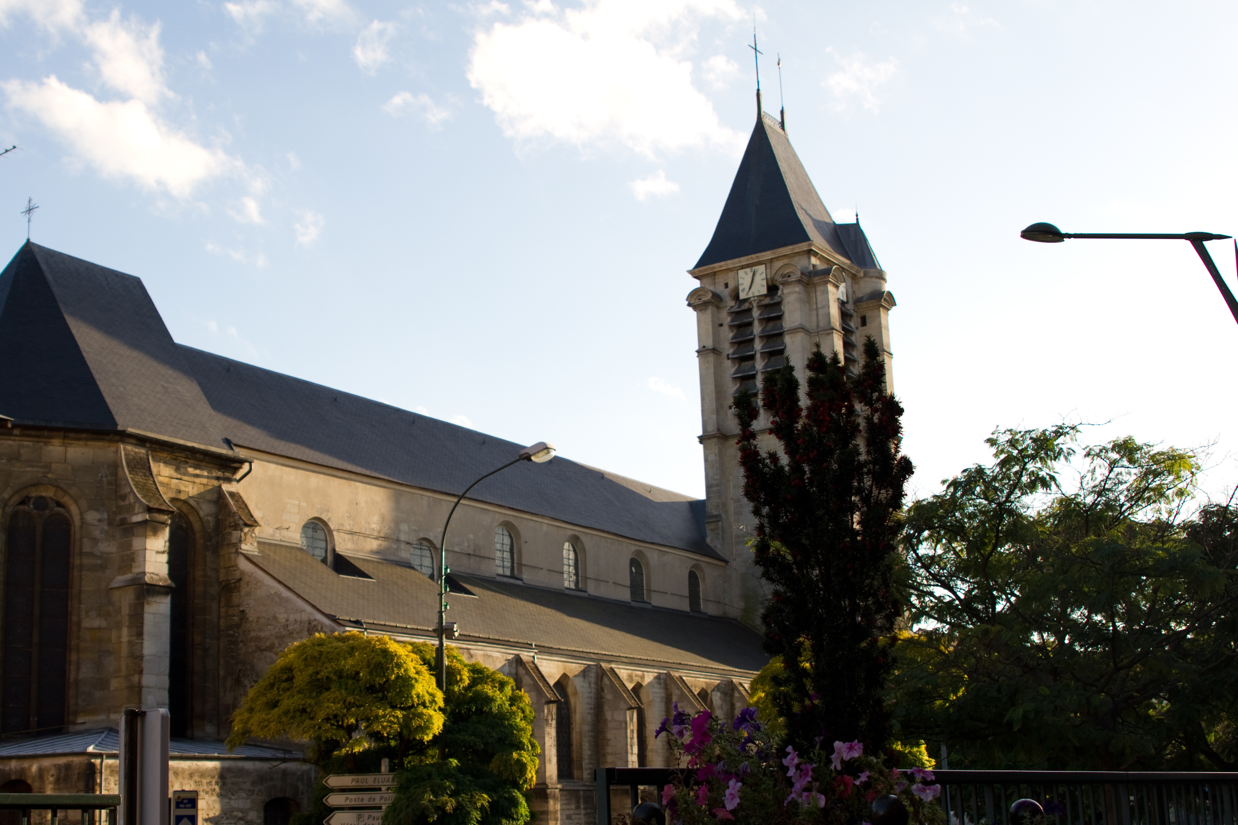 St Cyr - ste Julitte-pignon nord .